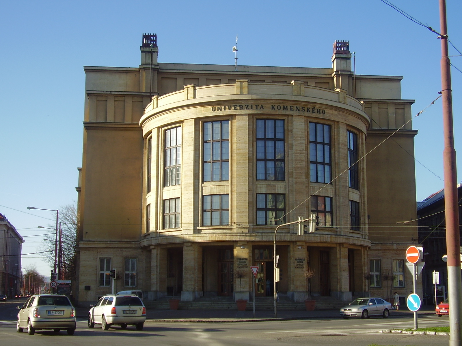 Univerzita Komenského